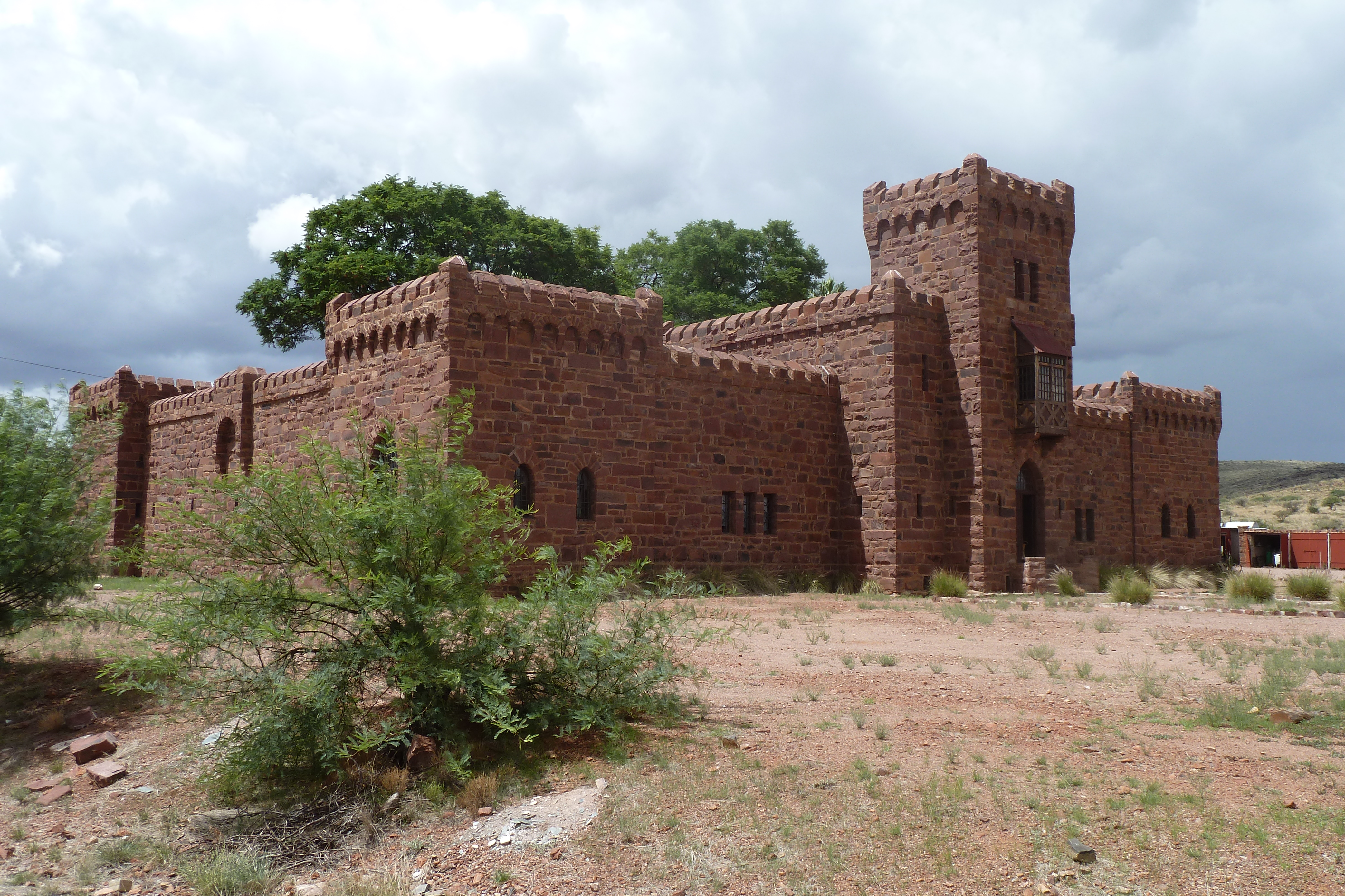 Schloss Duwisib Namibia